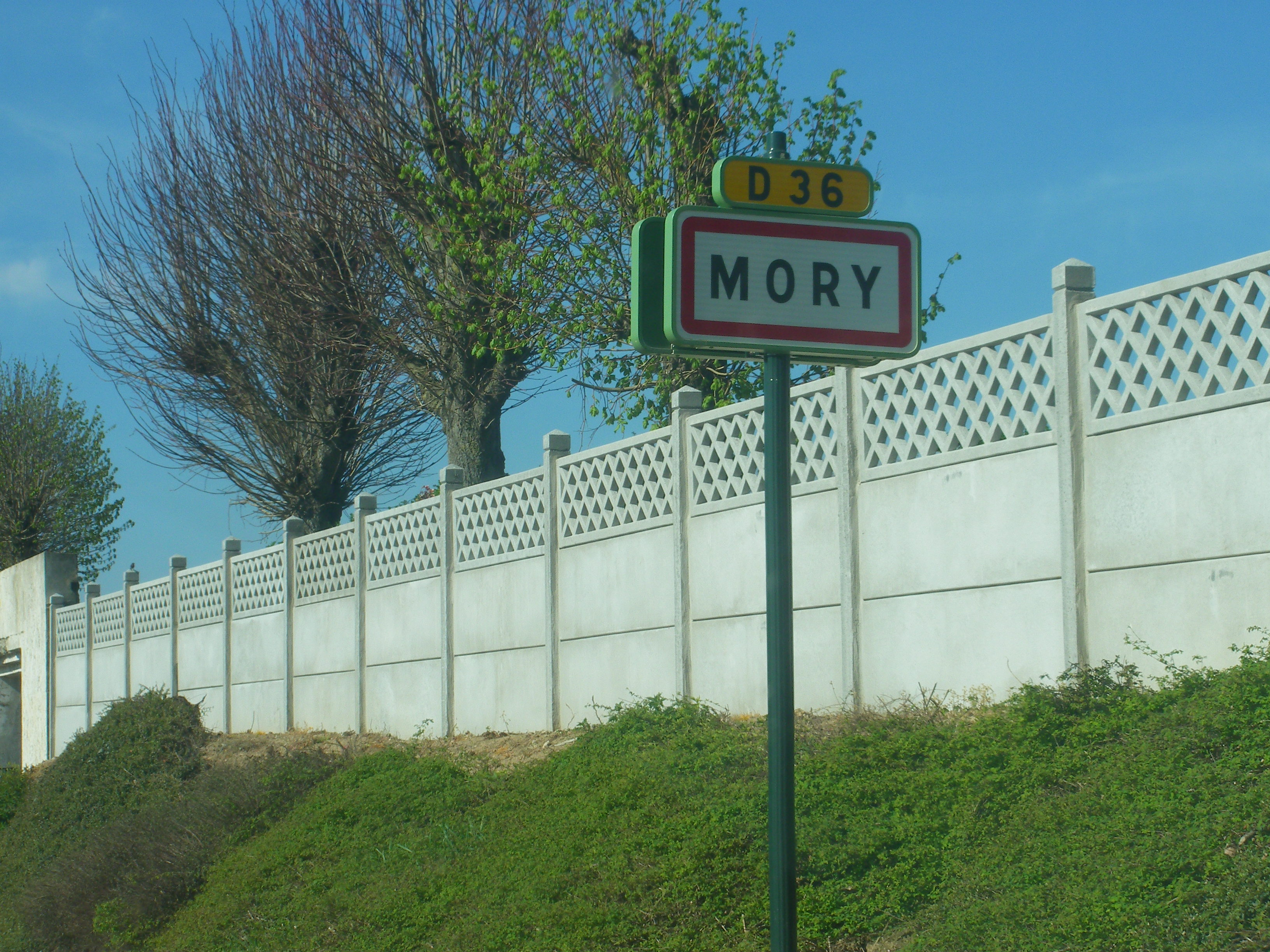 Vue d'un panneau d'entrée de la commune de Mory.